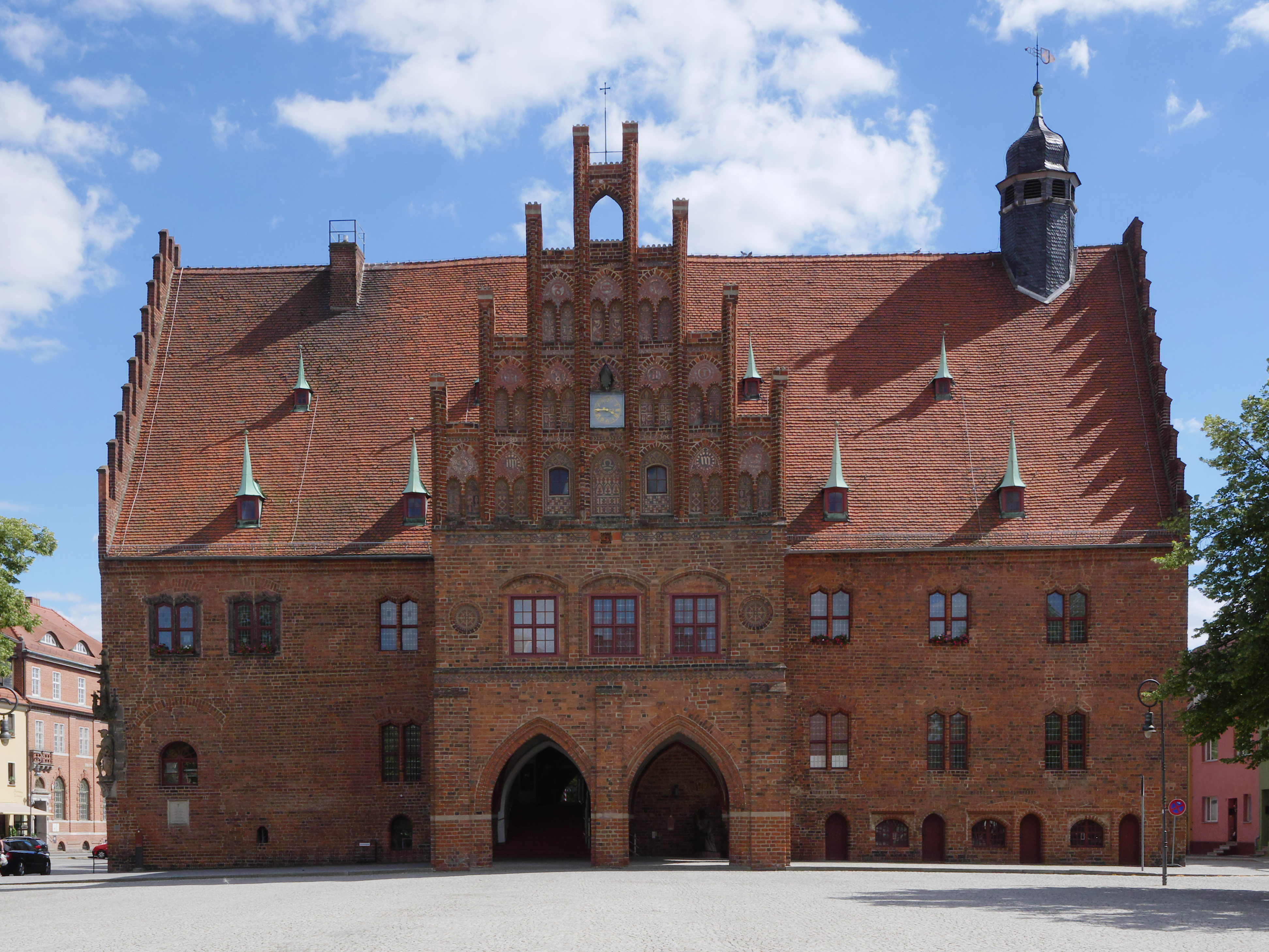 Rathaus Jüterbog, Ansicht vom Marktplatz aus Norden